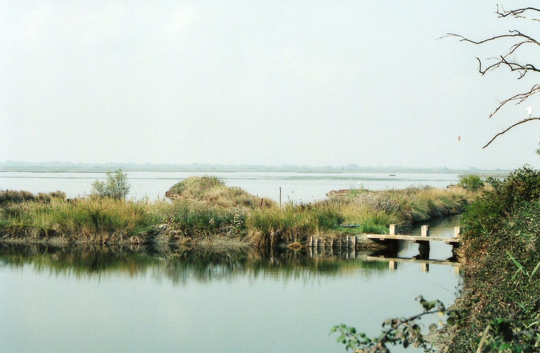 Oasi Canneviè-Porticino This is a photo of a monument which is part of cultural heritage of Italy.